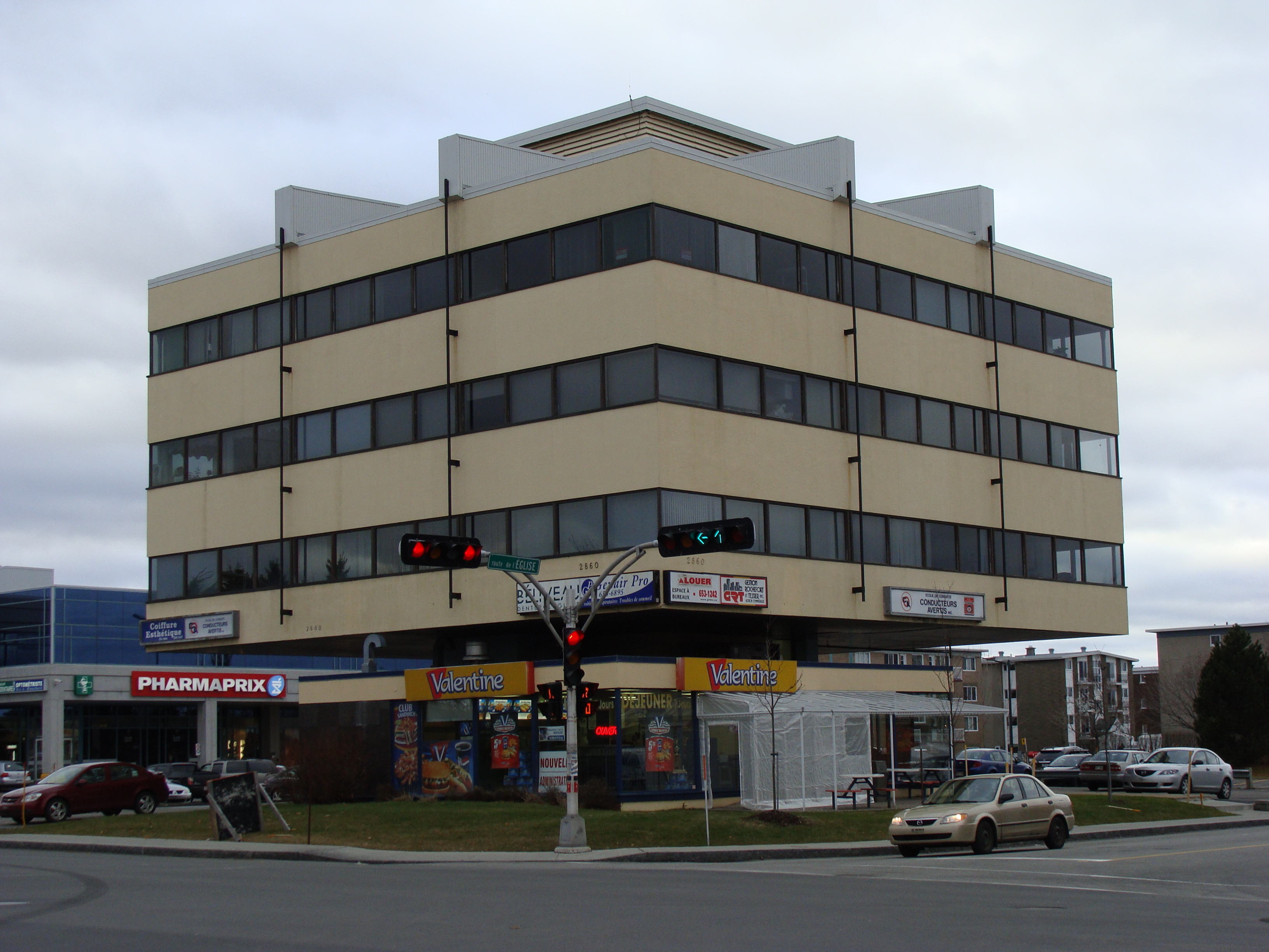 Édifice commercial et restaurant Valentine, au coin du chemin des Quatre-Bourgeois et de la route de l'Église, à Québec.